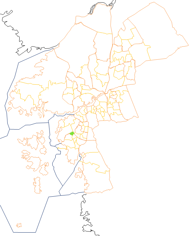 Karta som visar primärområdes belägenhet i Göteborg